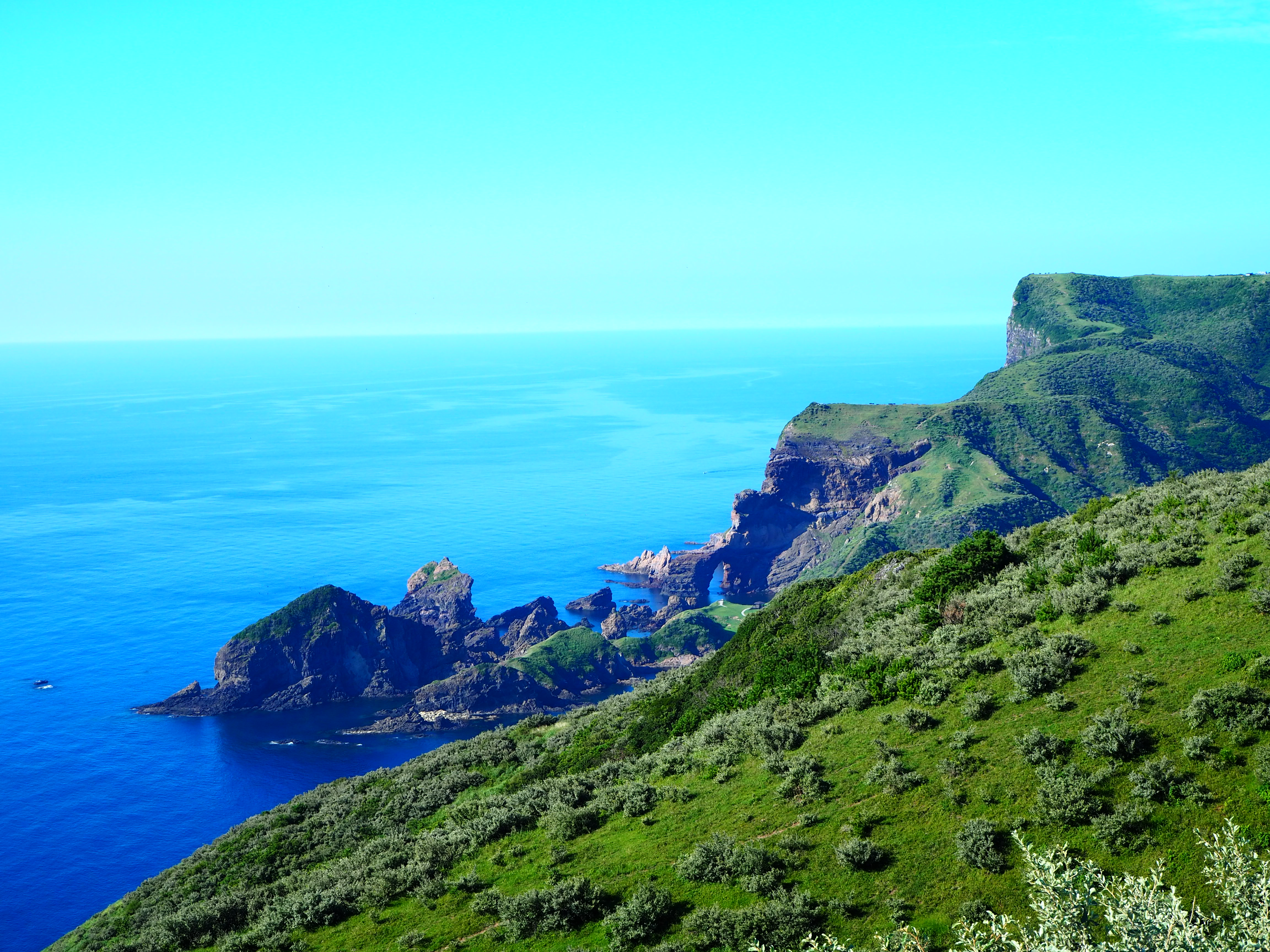 赤尾展望台から見える景観Olympus E-M10 Mark III